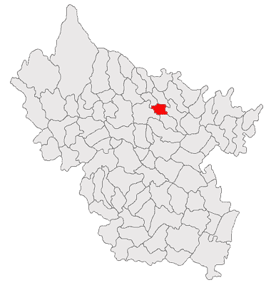 Categorie:Hărţi ale judeţului Buzău